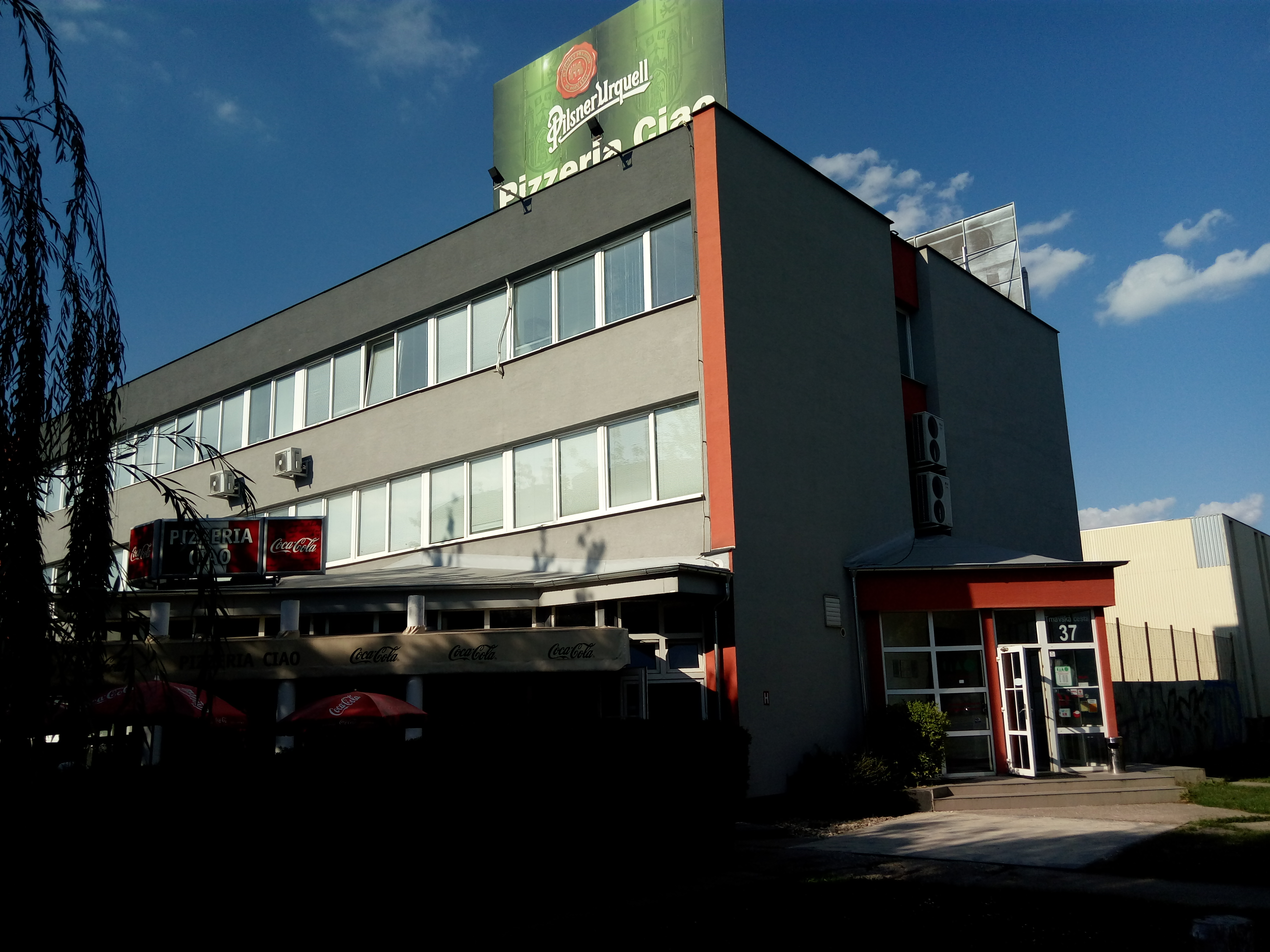 Trnavská cesta 37, Nové Mesto, Bratislava